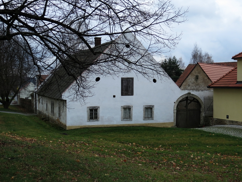 Usedlost Bolevec čp. 1, Plzeň 1-Bolevec, Bolevecká náves 1/3, Plzeň.